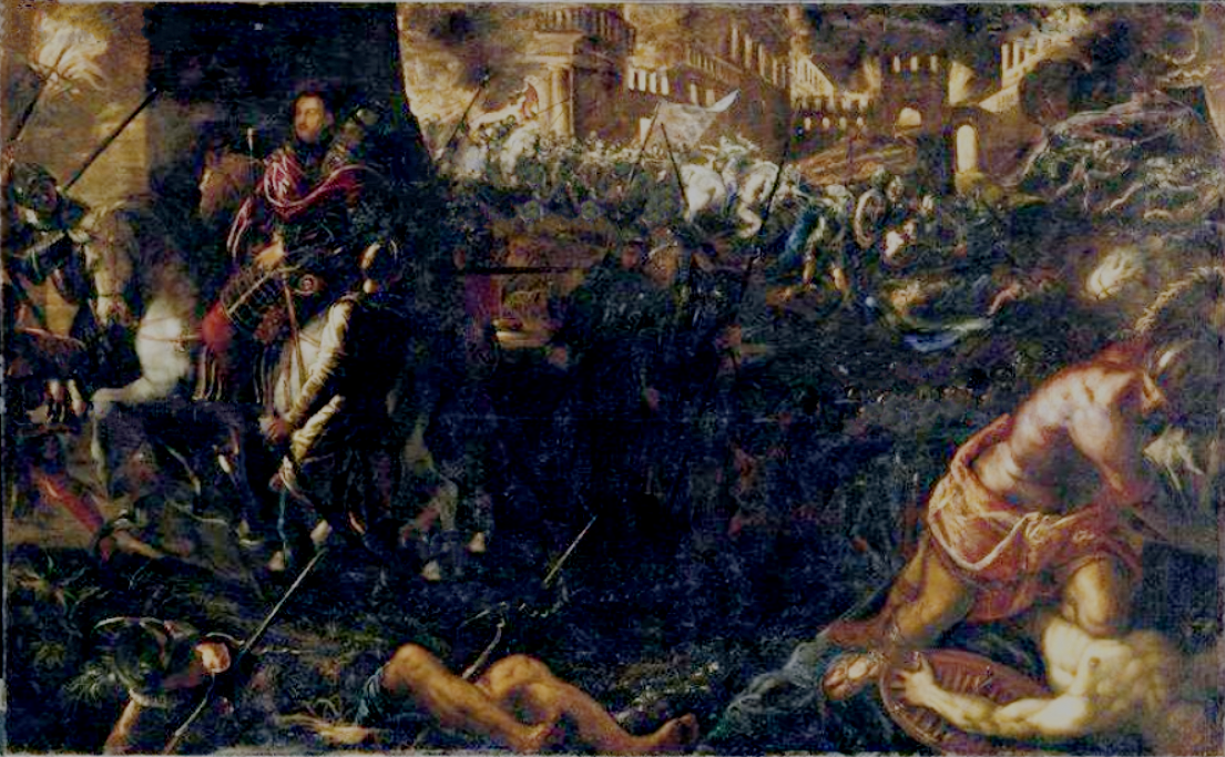 Federico II Gonzaga entra vittorioso a Milano - Olio su tela, cm. 212 × 283.5